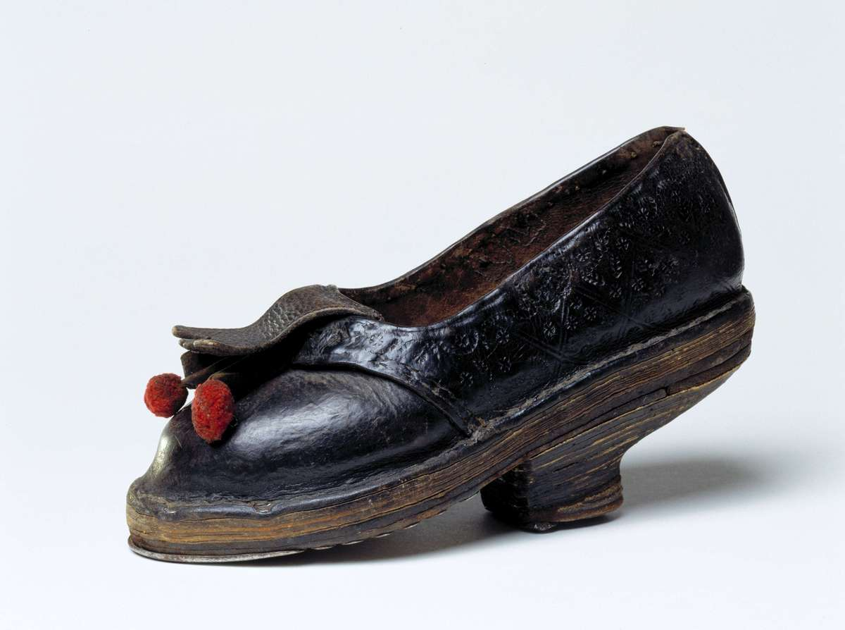 Damsko från Djura socken, Dalarna. Inv nr 149418. Klacken är placerad under hålfoten vilket var vanligt under en period fram till 1800-talets mitt.